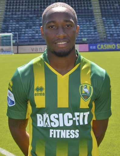 Ludcinio Marengo